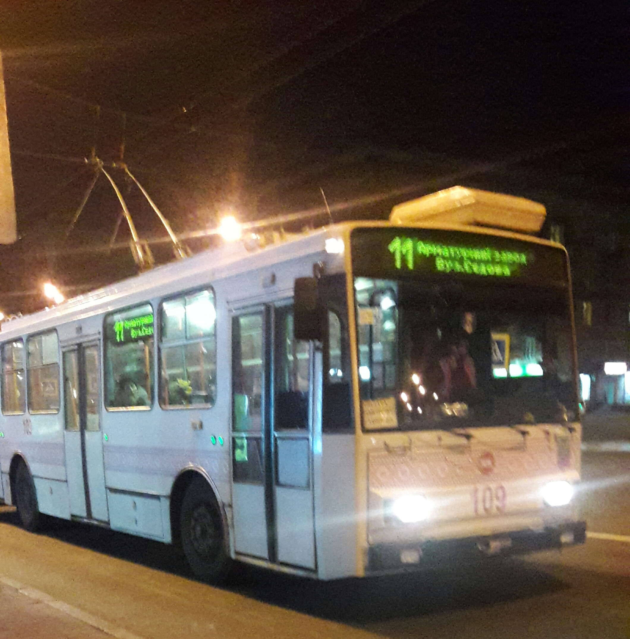 Zaporizhzhya, Soborny Avenue